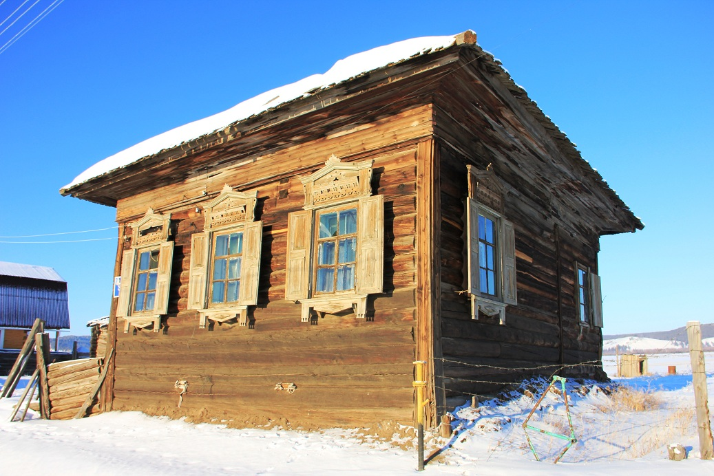 Кильдямцы